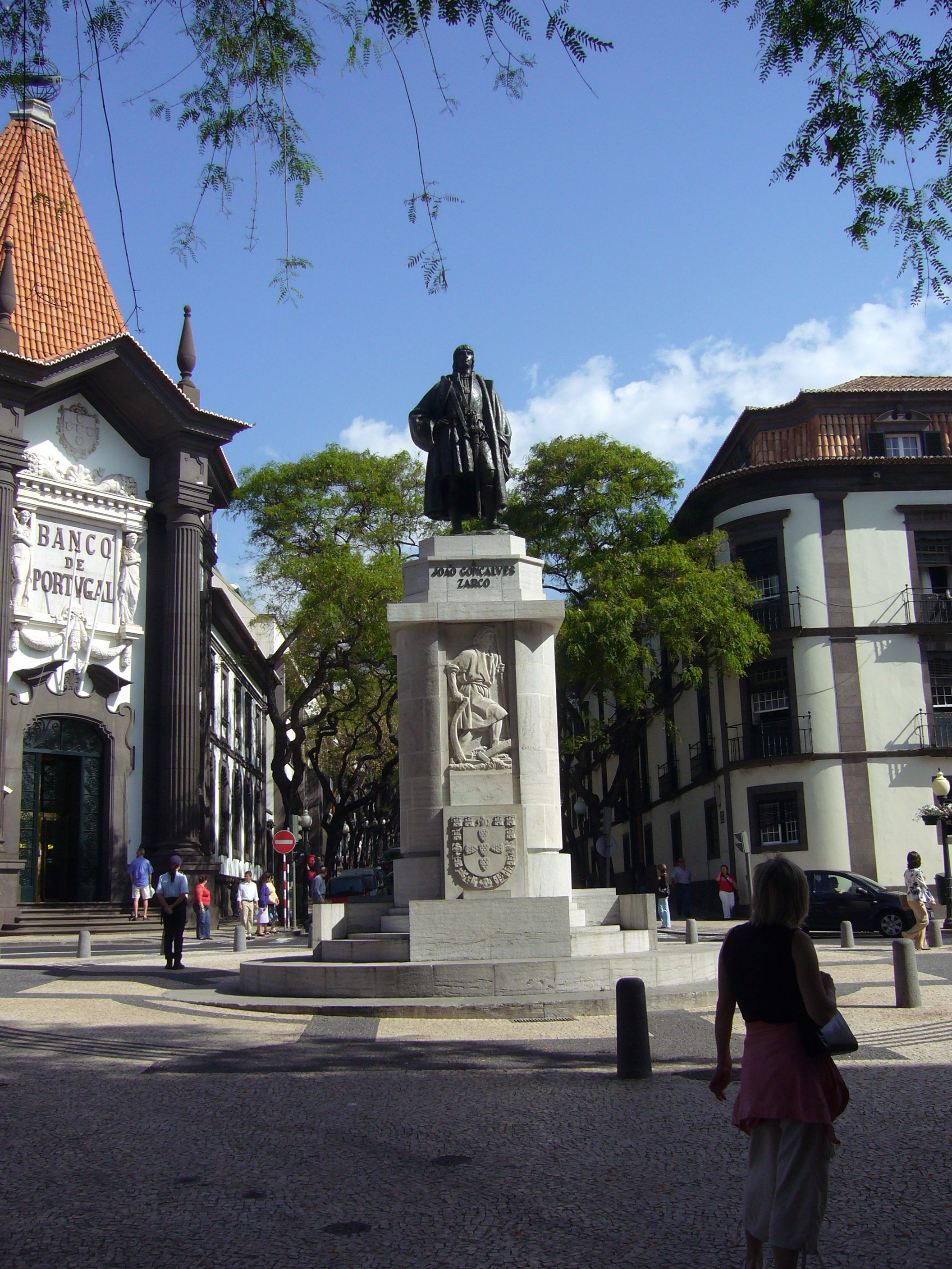 Socha Zarca at Avenida zarco, Funchal.